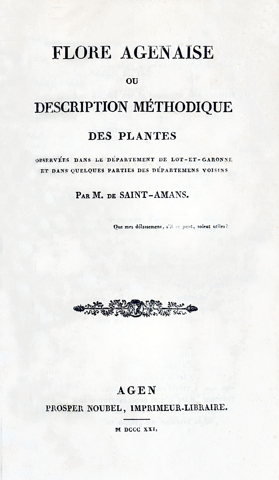 Jean Florimond Saint-Amans - Flore agenaise; ou, Description méthodique des plantes observées dans le département de Lot-et-Garonne et dans quelques parties des départemens voisins, Editura Prosper Noubel, Agen 1821, first page